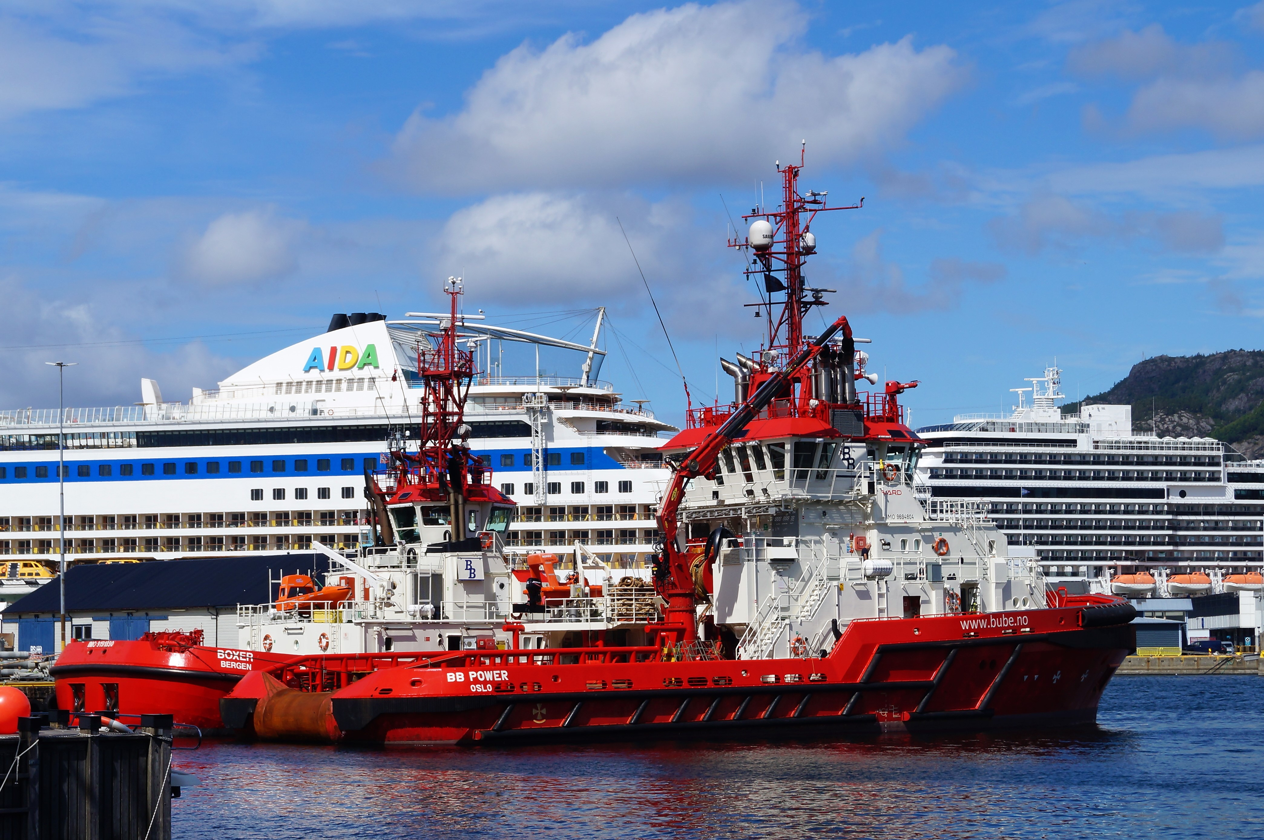 «BB Power» i Bergen